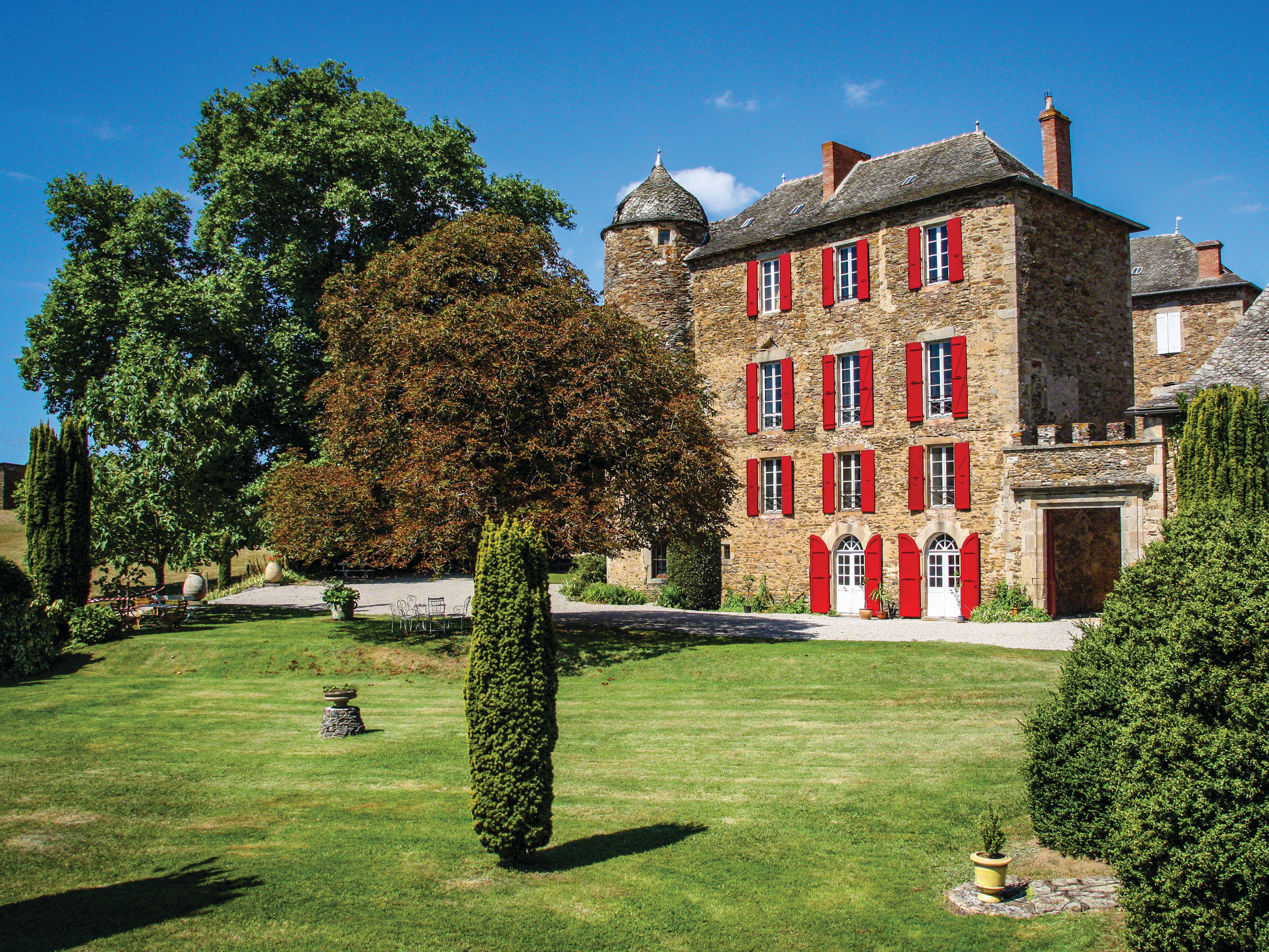 Le Château du Bosc, vu du Parc, avec tous ses volets rénovés en 2016. Façade Sud. .